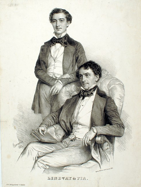 id. Lendvay Márton és fia, ifj. Lendvay Márton. Barabás Miklós metszete (1852)